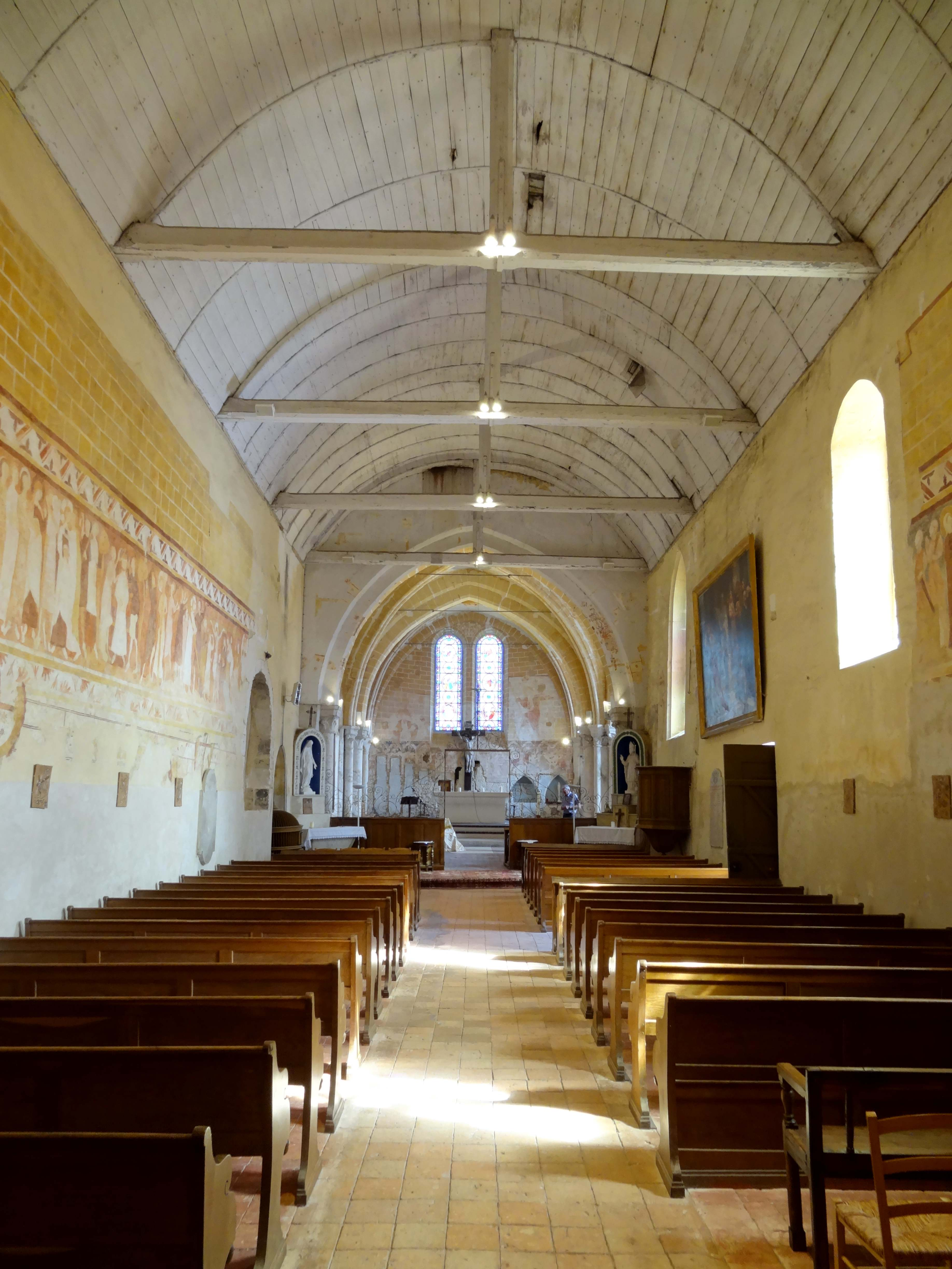 Intérieur de l'église - voir titre.